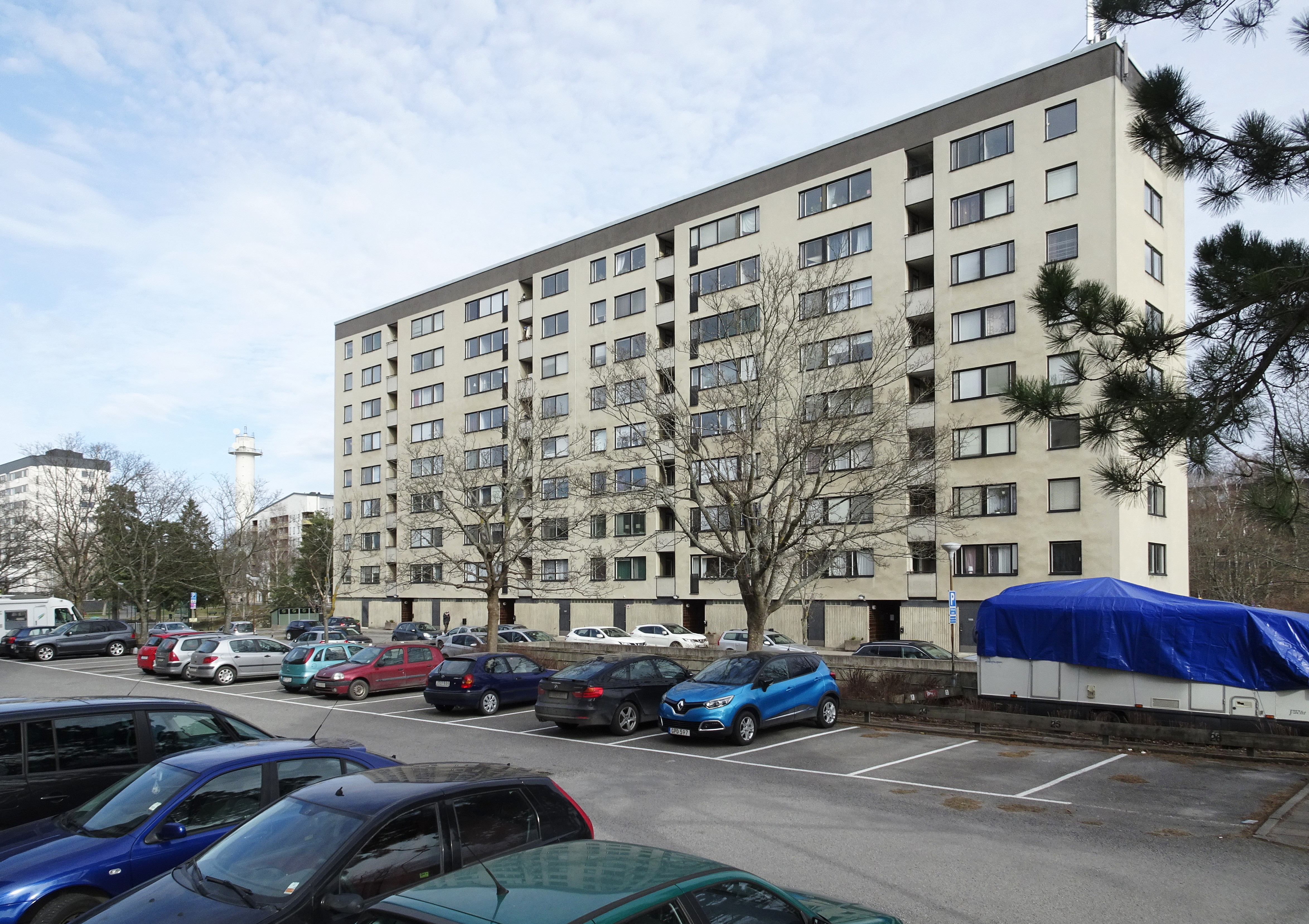 Fastigheten Coldinuorden 3, Bredäng, arkitekt Kjell Abramson byggår 1965